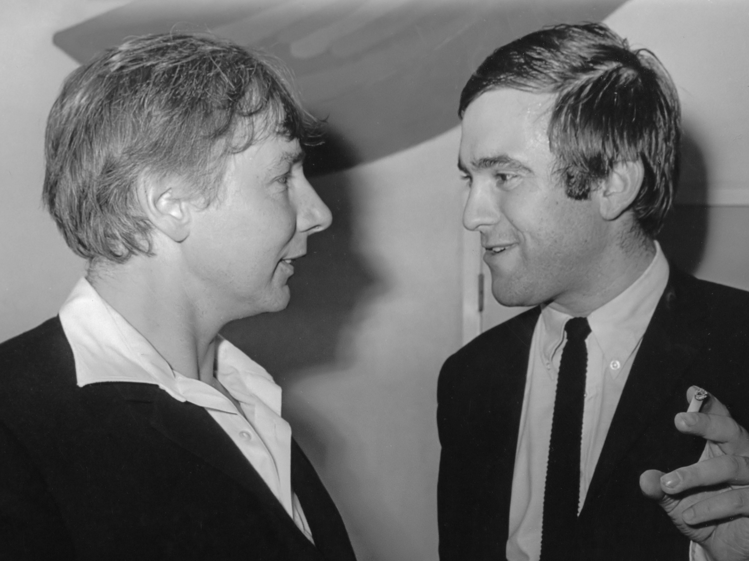 Poëzieprijs van de gemeente Amsterdam uitgereikt in Stedelijk, links D. Hillenius poezieprijs 1967 en K. Schippers Poëzieprijs 1966 in gesprek